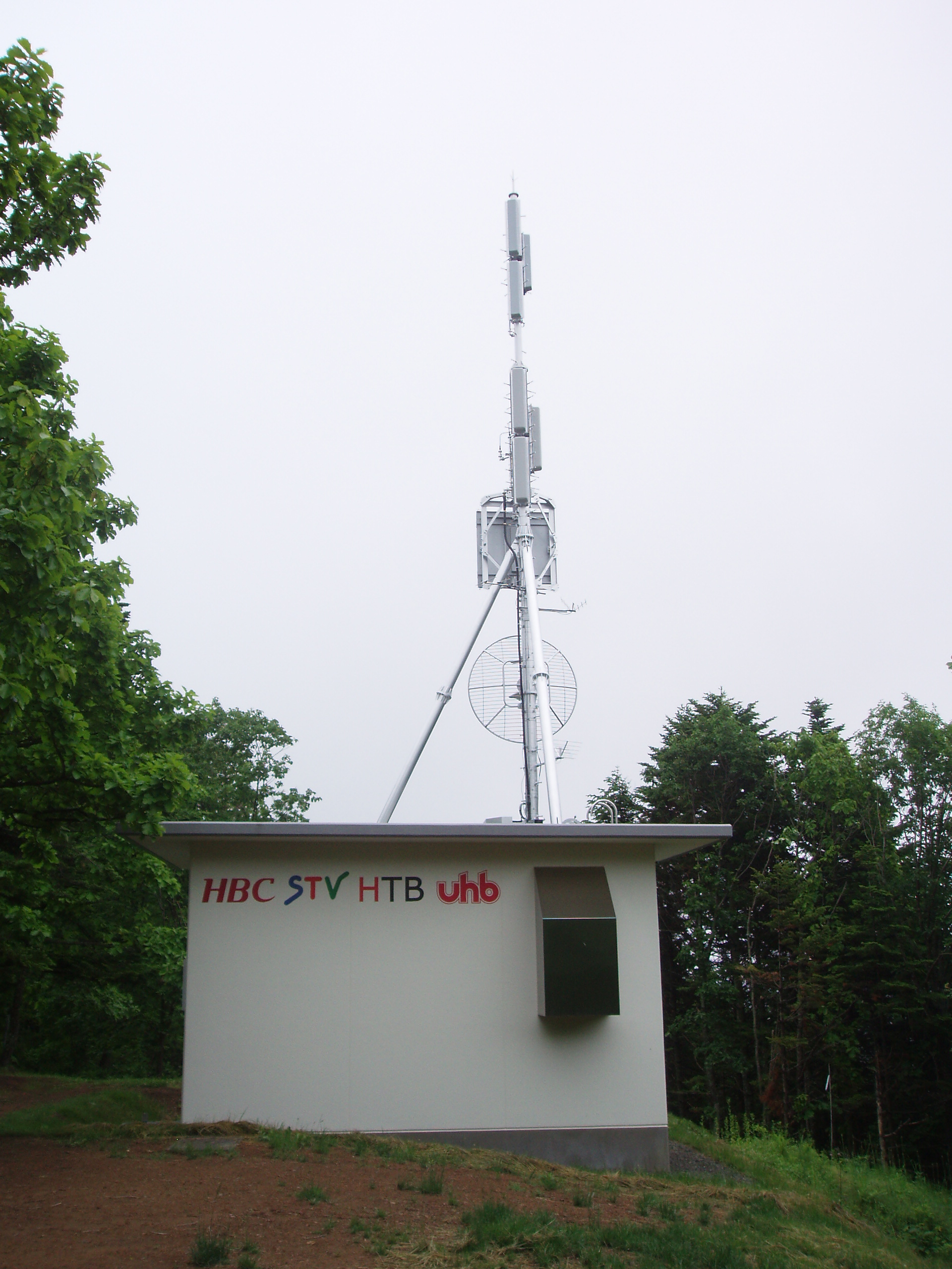 北見中継局（HBC・STV・HTB・UHB）